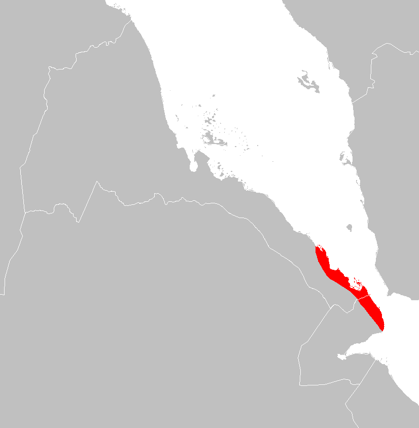 Eritrean coastal desert ecoregion map